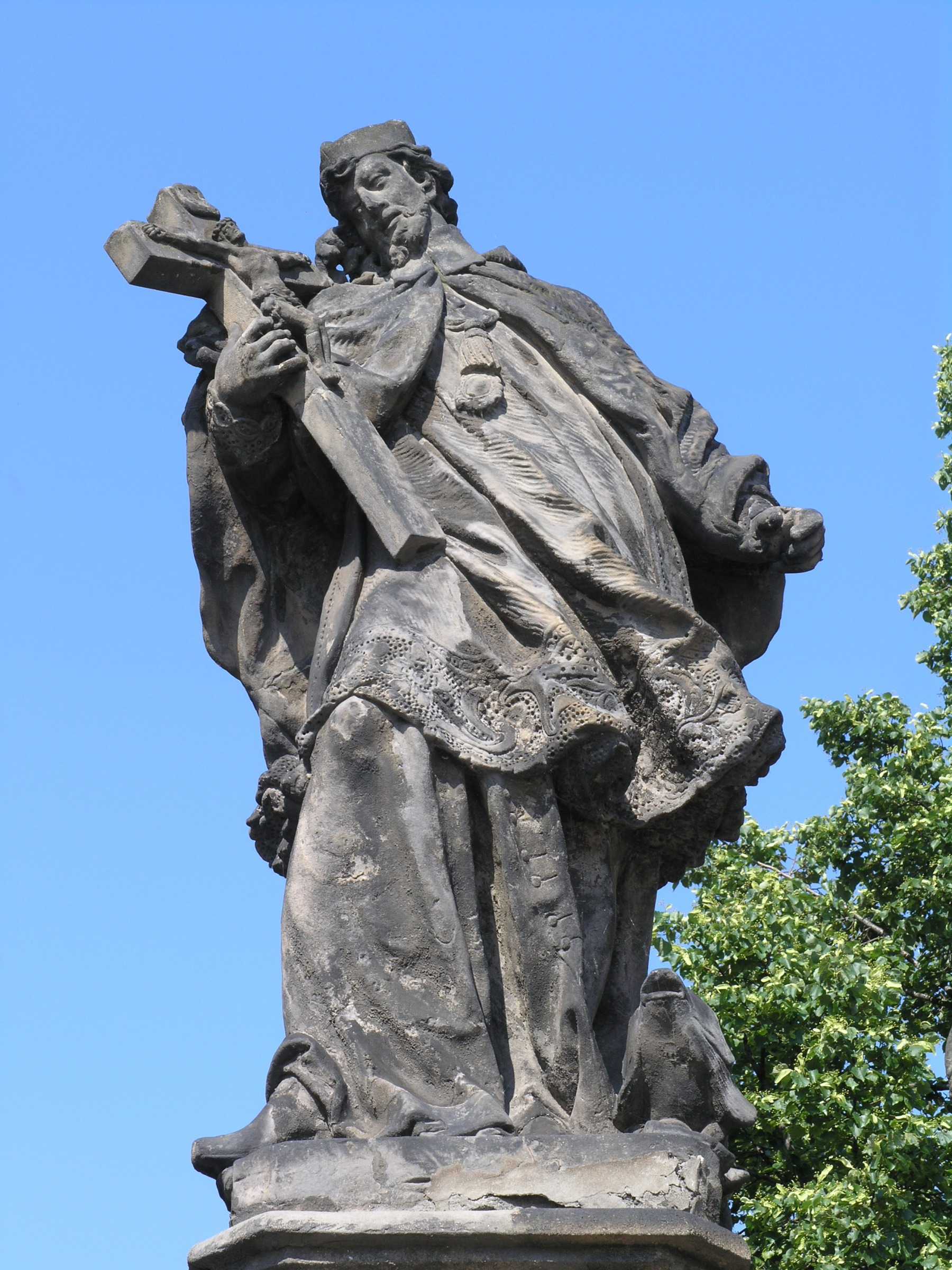 Praha, Hradčany - detail sochy svatého Jana Nepomuckého z roku 1752 od J.A. Quittainera. Na Pohořelec přemístěna z Hradčanského náměstí